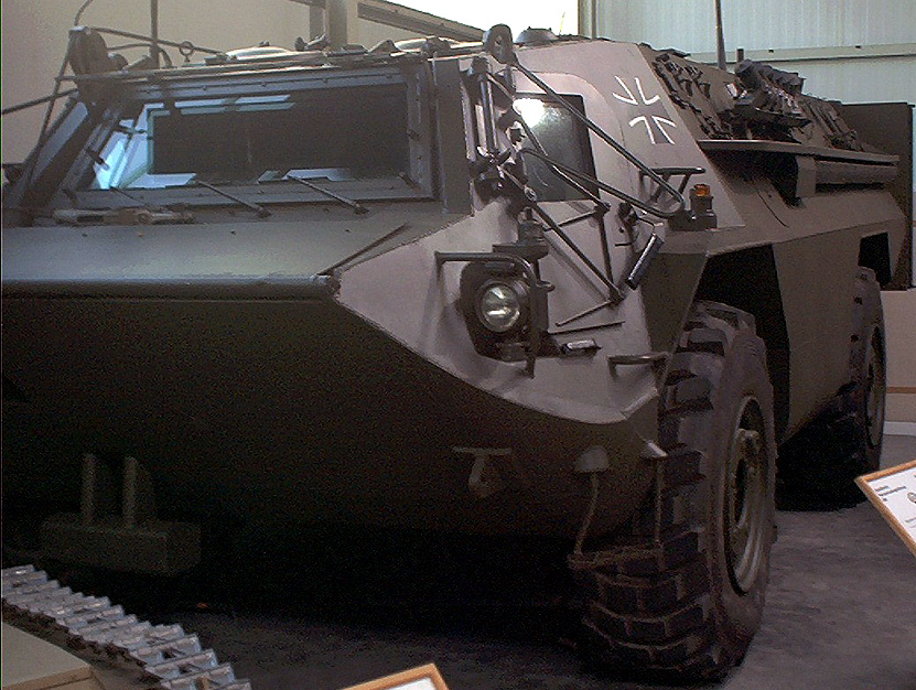 Beschreibung: zweiachsiger Prototyp des TPz 2, der als Amphibisches Pionier Erkundungsfahrzeug gedacht war in der Wehrtechnischen Studiensammlung in Koblenz aufgenommen Fotograf: Stahlkocher (Bearbeitung: Darkone)